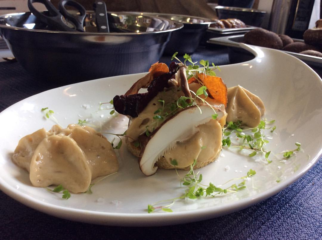 Receita de galo de Mos.